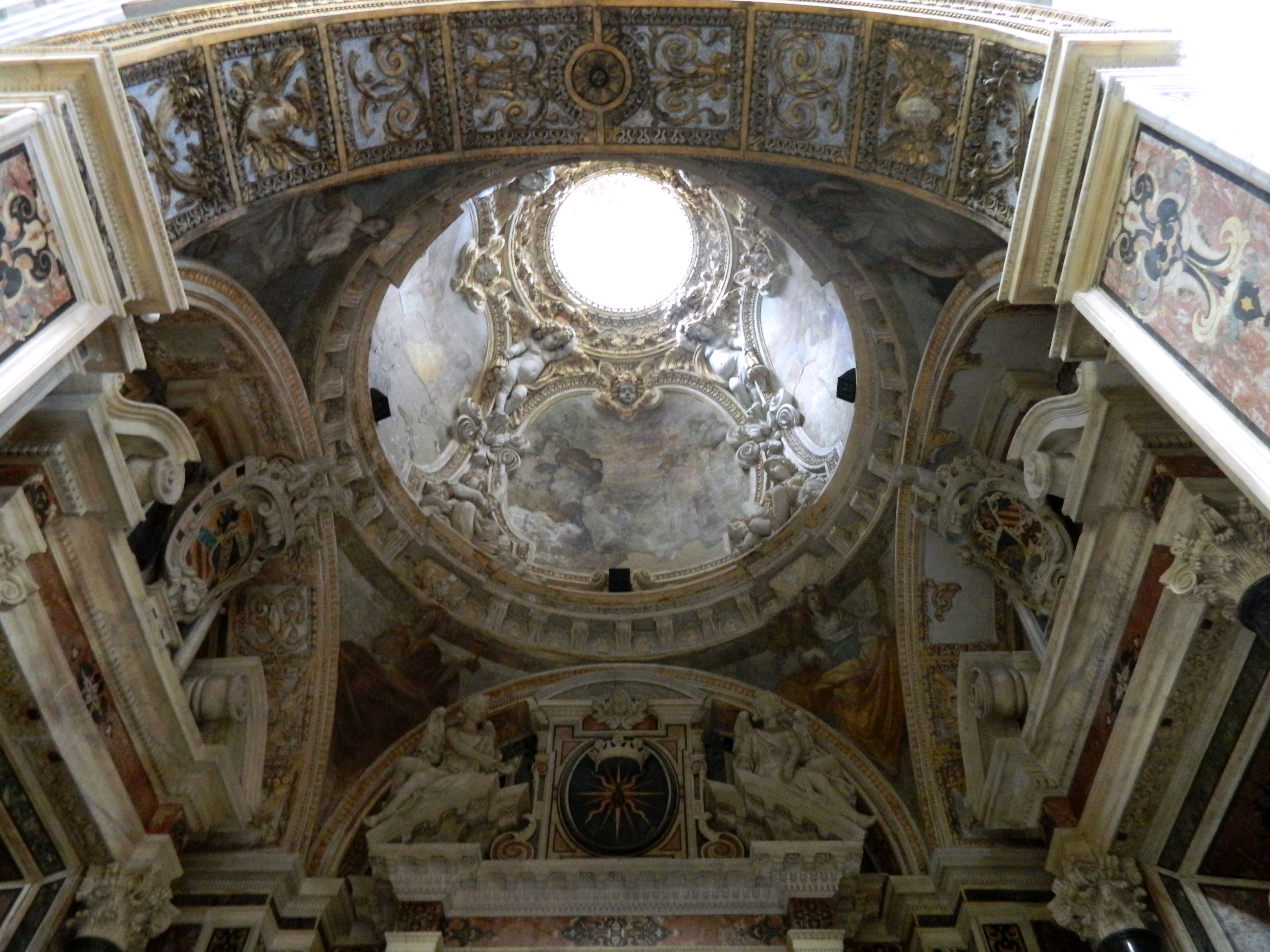 Napoli, Basilica di san Paolo Maggiore - Cappella Firrao